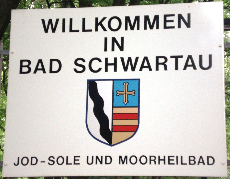 Schild am Ortseingang von Bad Schwartau